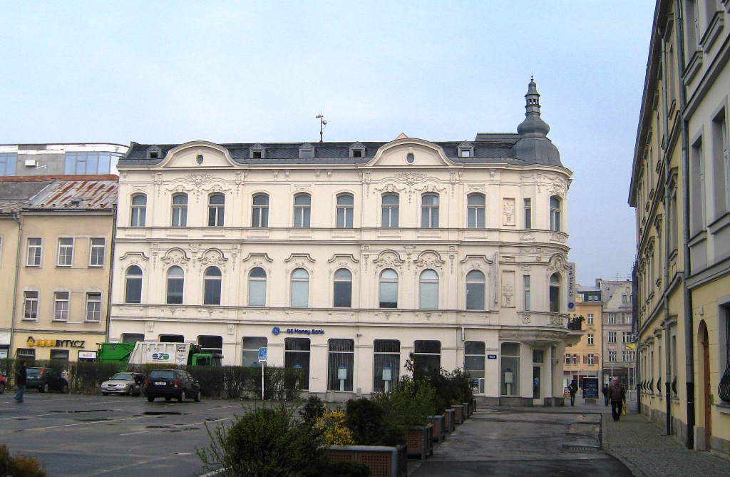 Velká 2/Masarykovo náměstí 33, Moravská Ostrava, Dům arch. F. Neumanna z roku 1898, bývalý dům Divadla loutek.